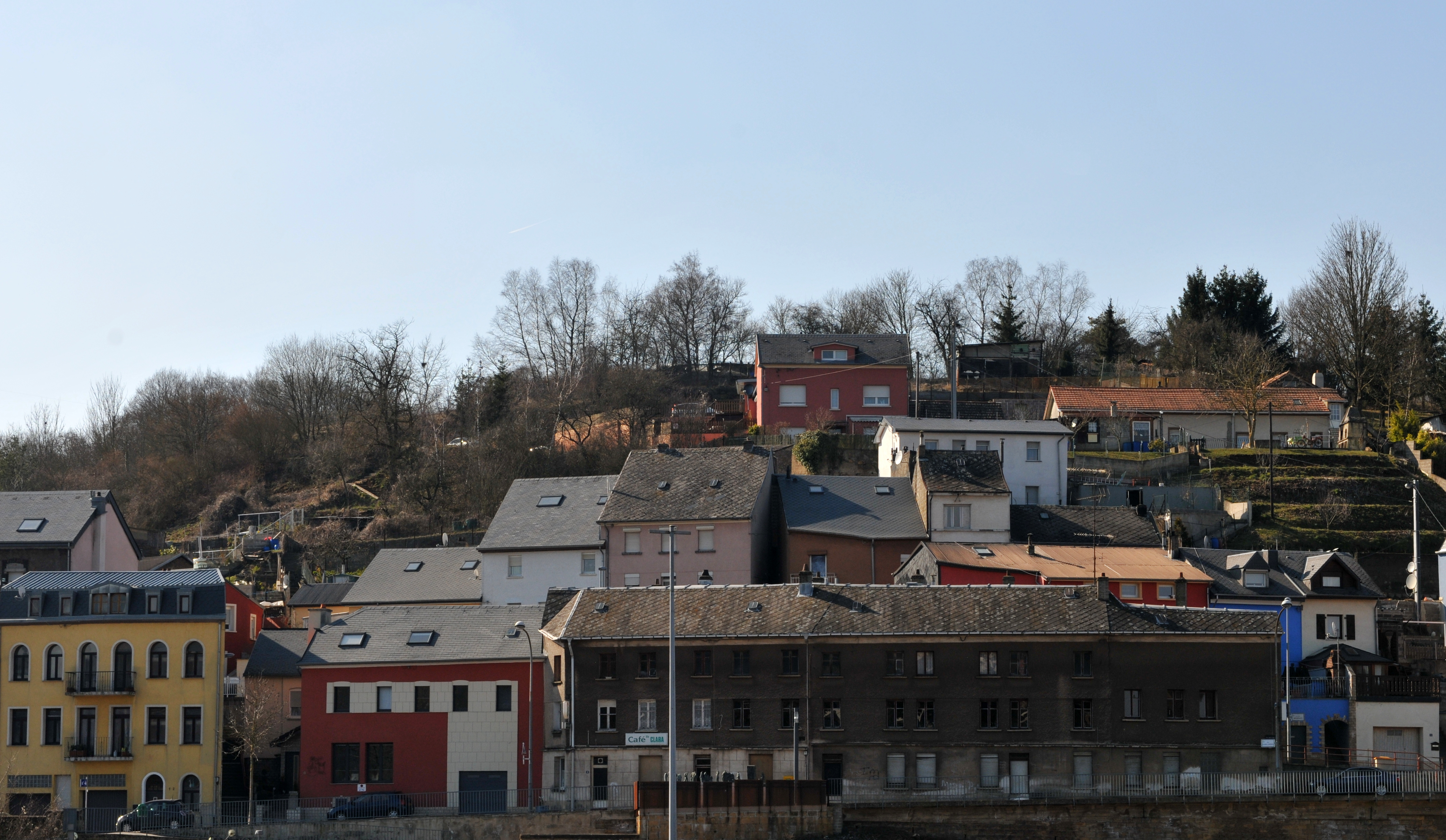 Vue op de Quartier Italien zu Diddeleng.